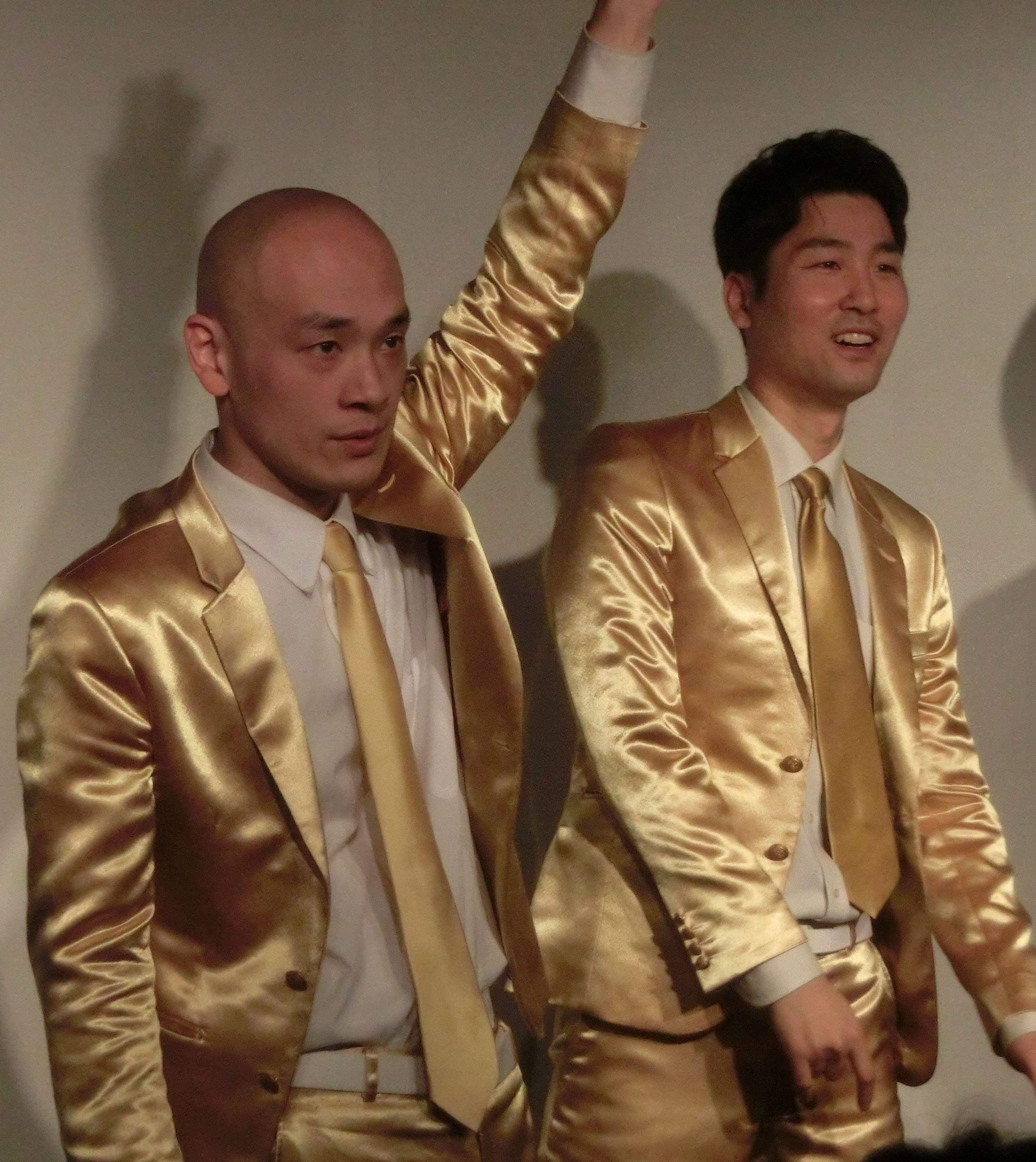 アモーン2018年